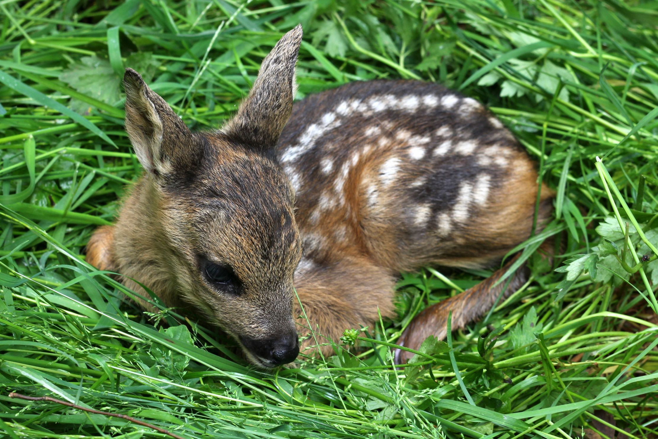 Reekalf gefotografeerd nabij Helvoirt, Nederland